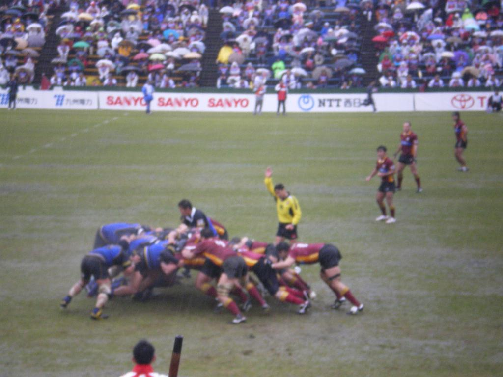 Fukuoka Sanix Blues v Kyuden Voltex at Global Arena, Munakata, Fukuoka prefecture